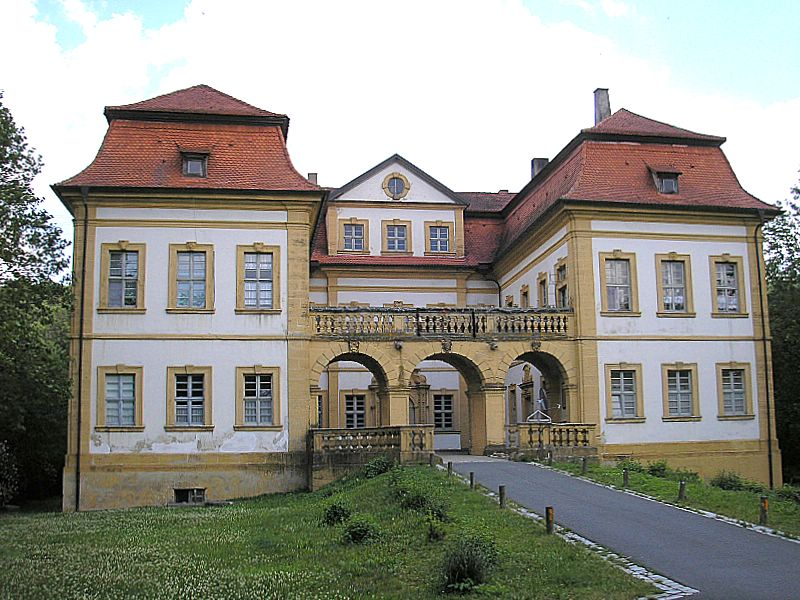 Schloss Heilgersdorf (Landkreis Coburg, Oberfranken) / Heilgersdorf Castle between Ebern and Seßlach, Upper Franconia, Germany. Gesamtansicht / Total view. Eigene Aufnahme, Juni 2006 / Own photo, June 2006